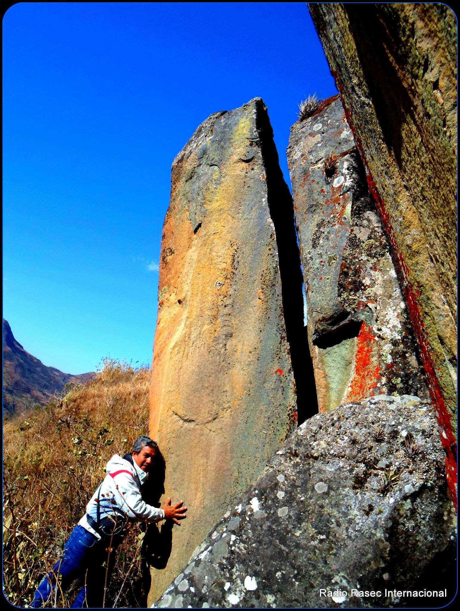 Megalithic of the Sanctuary of Lagunas, San Miguel de El Faique, Piura-Peru.